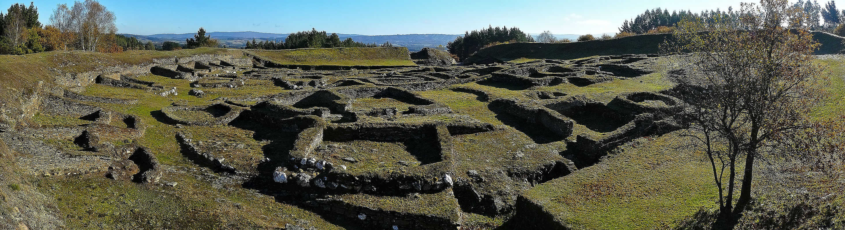 Panorámica do Castro de Viladonga